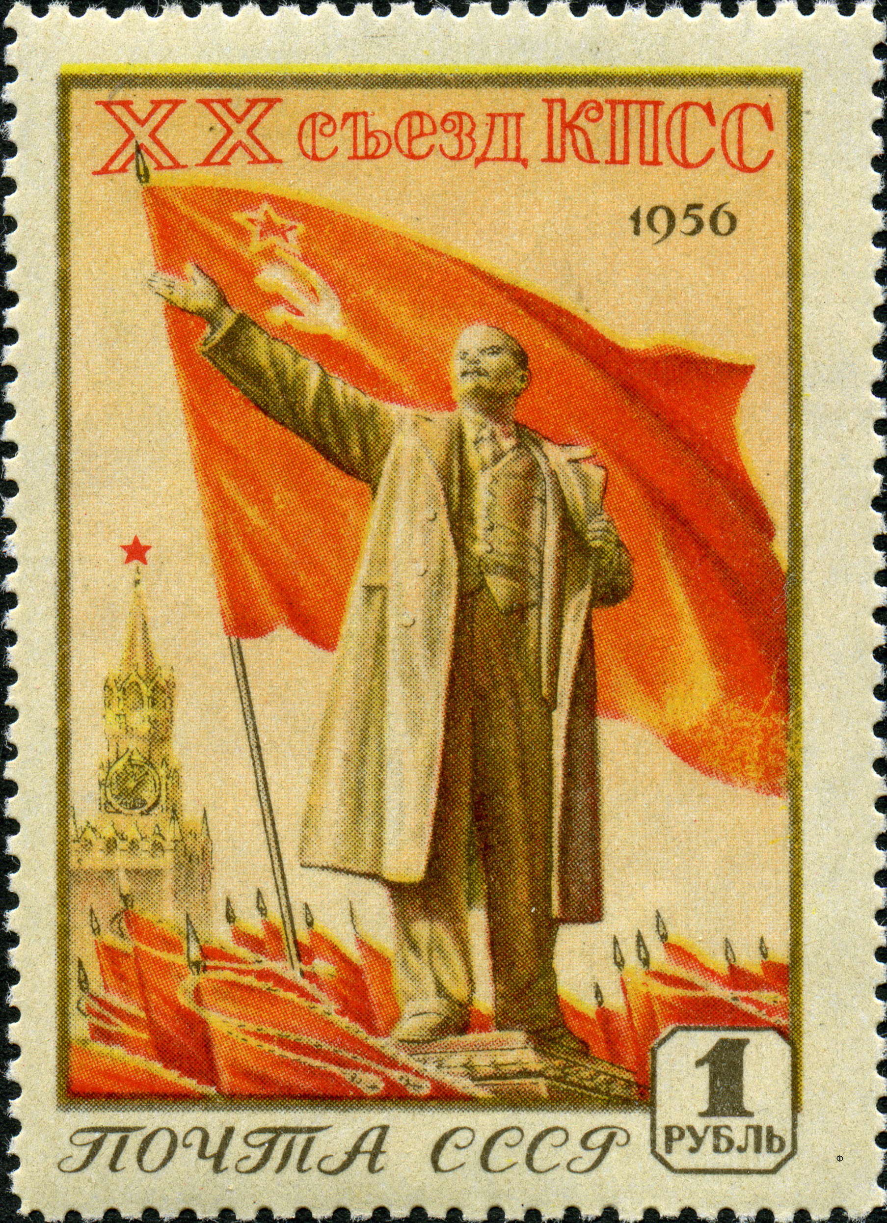 Марка СССР